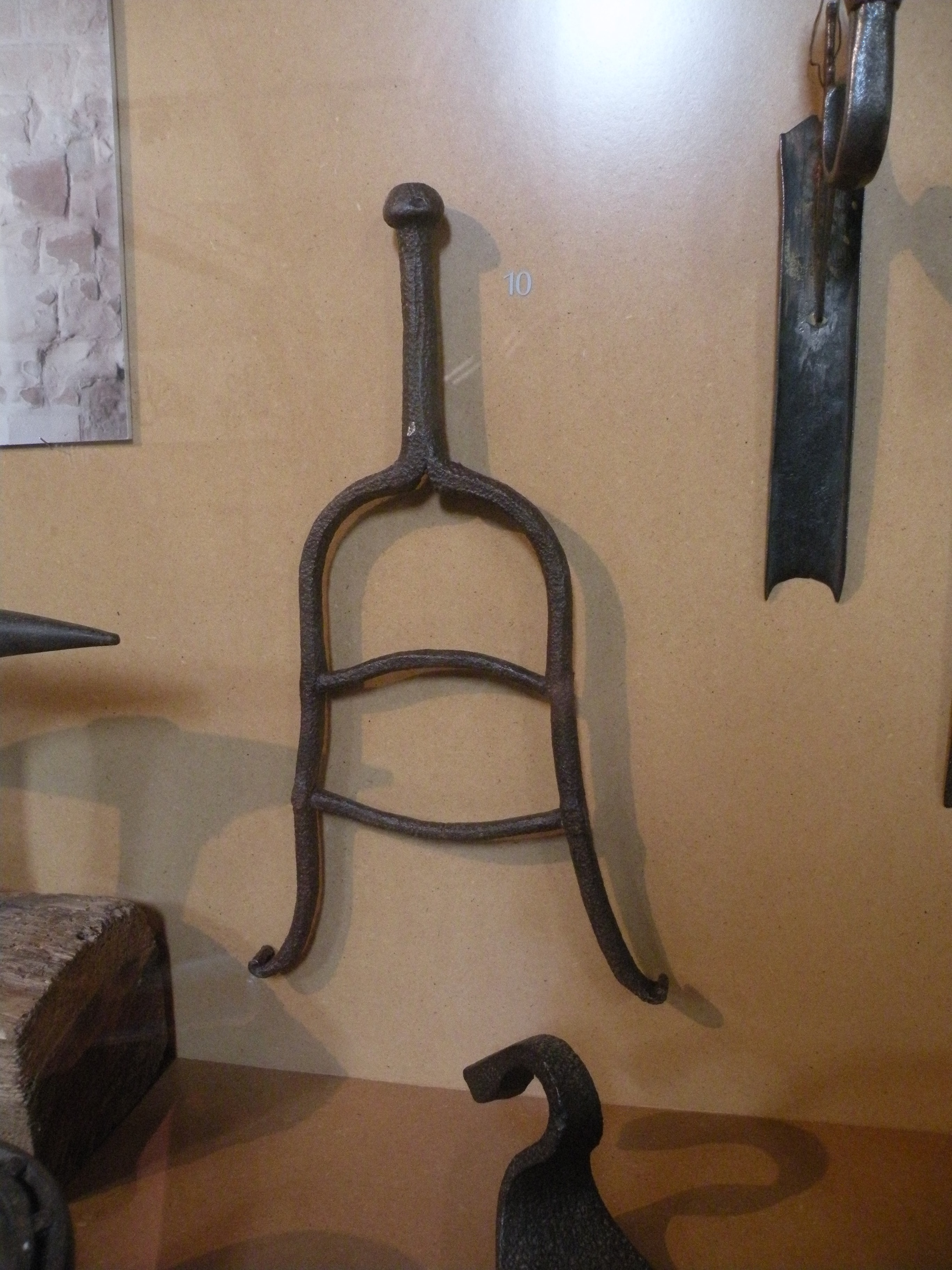 Collection du Musée du Vexin français